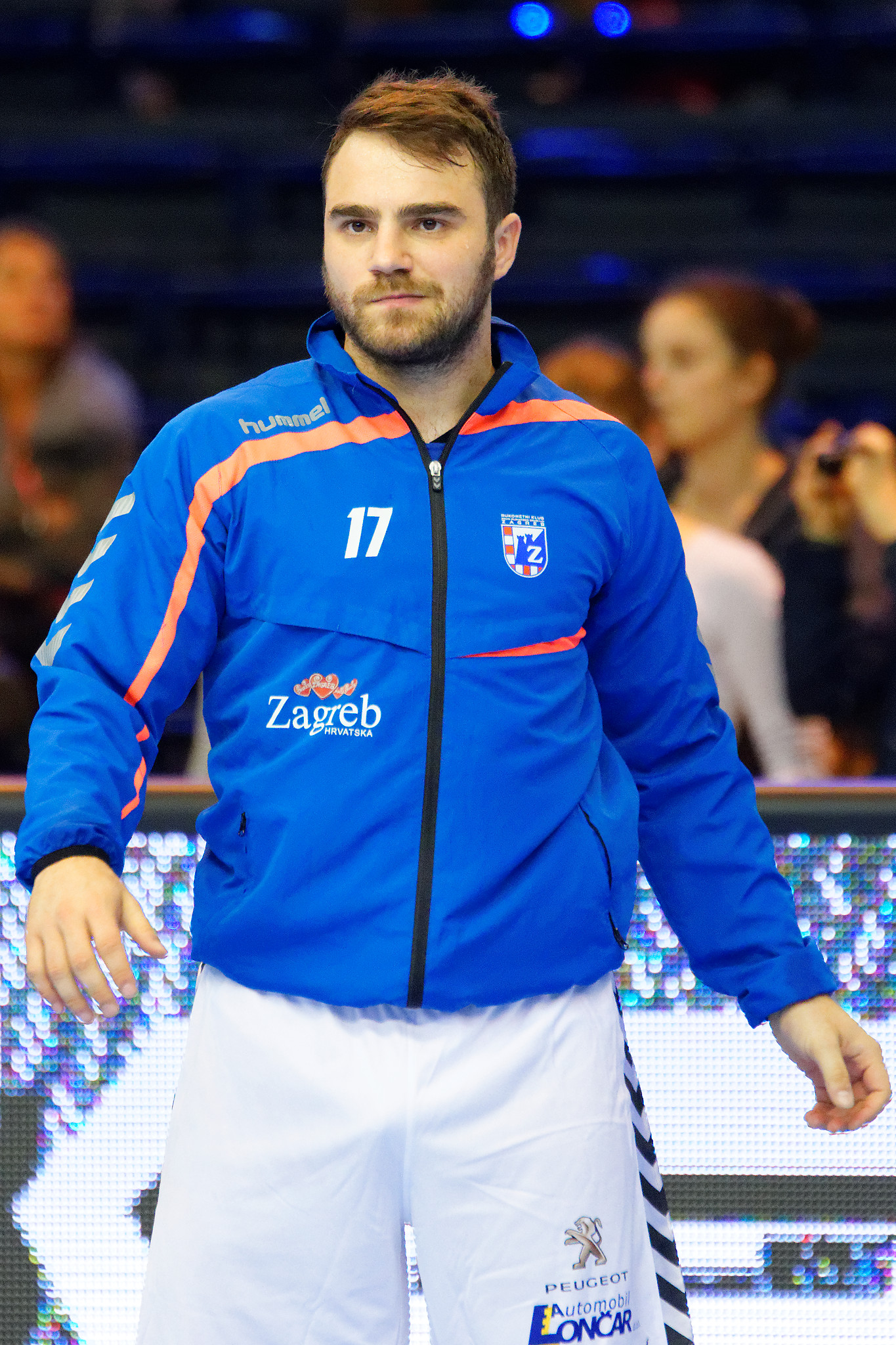 Rencontre de phase de groupe de la ligue des champions 2015-16 entre le PSG et le RK Zagreb. A la Halle Carpentier (Paris), le 11 ocotbre 2015.